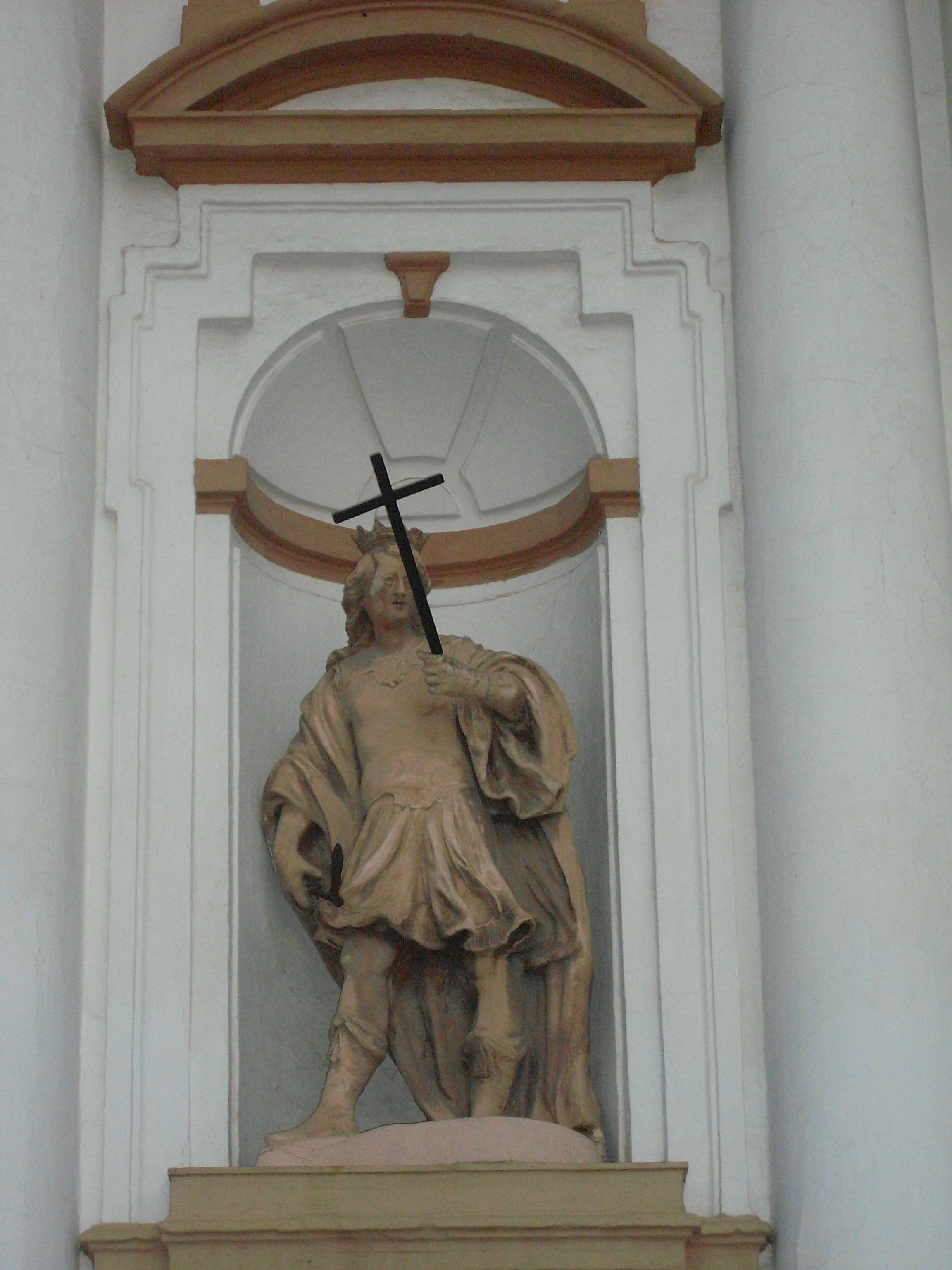 Detalle de la fachada, escultura que representa a San Hermenegildo.